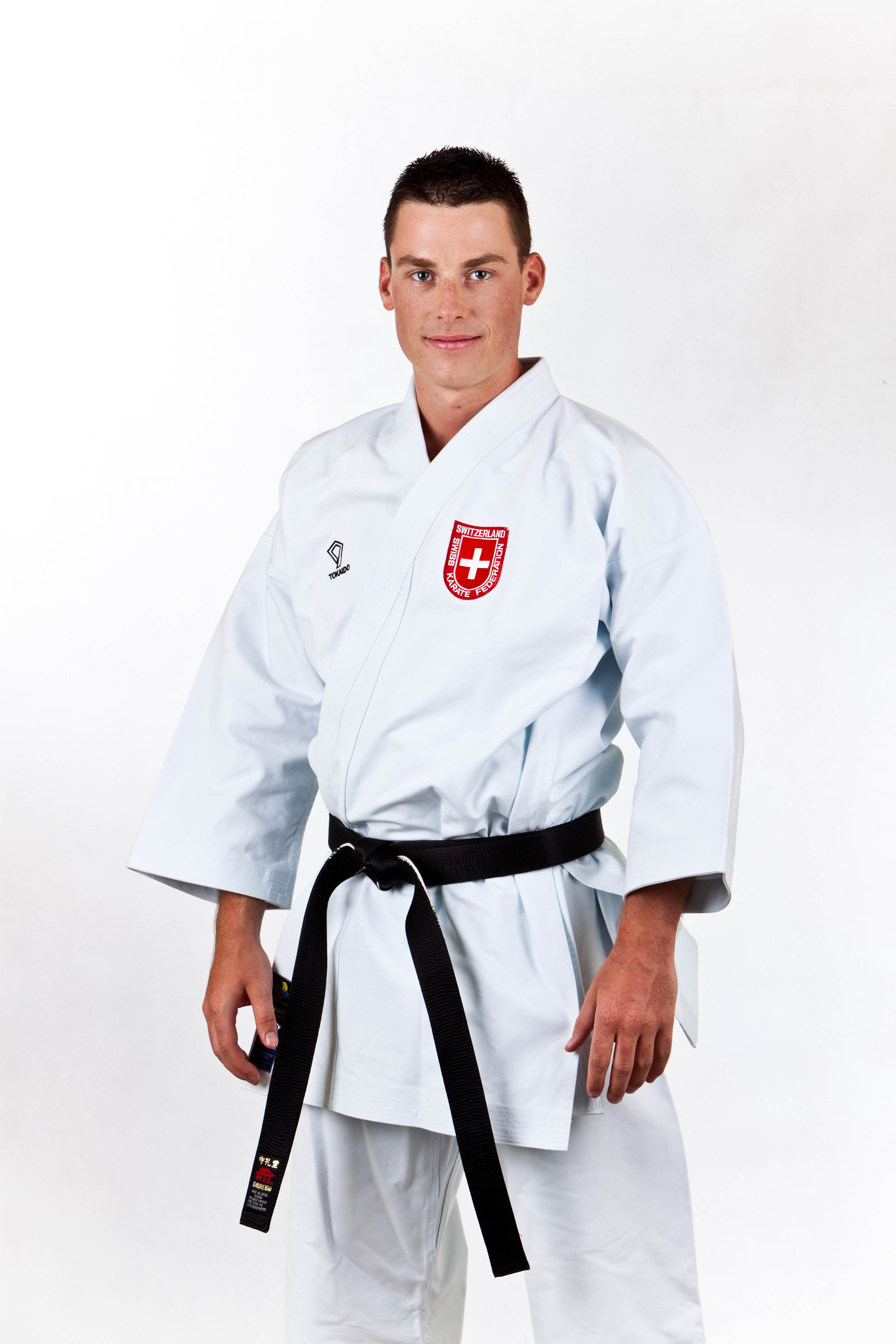 Sandro Massarotti, Schweizermeister Karate 2012